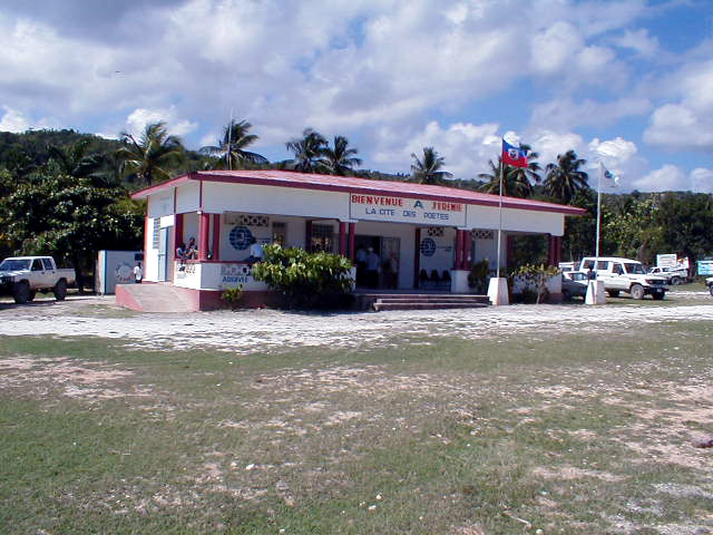 Airport closeup